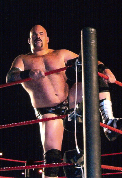 Matt Bloom